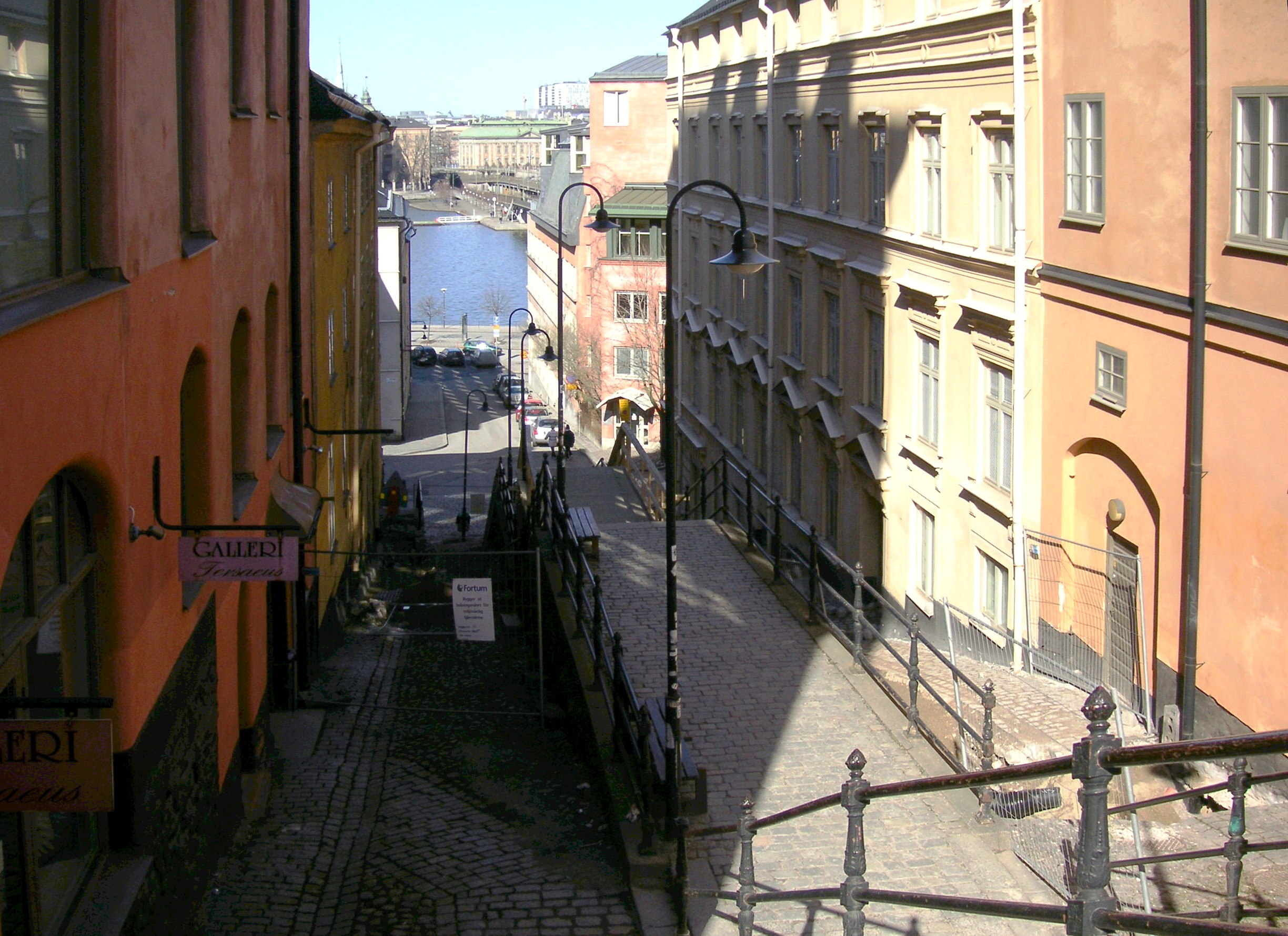 Pustegränd mot norr, t.v. kvarteret Stenbocken och t.h. kvarteret Överkikaren